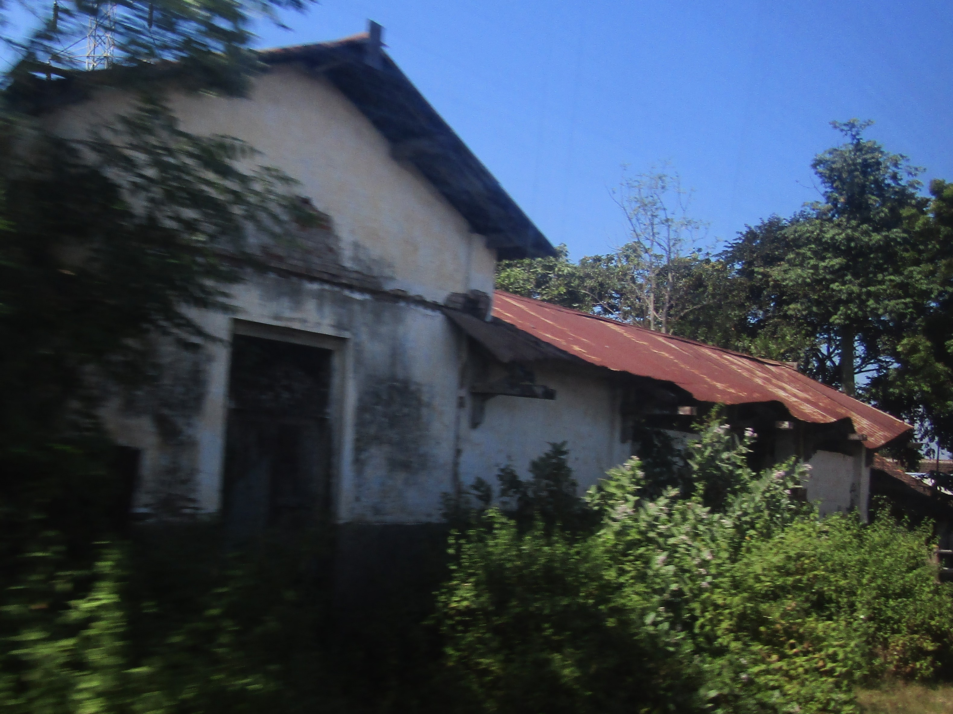 Stasiun nonaktif Jorongan, terletak di Desa Jorongan, Kecamatan Leces, Kabupaten Probolinggo.